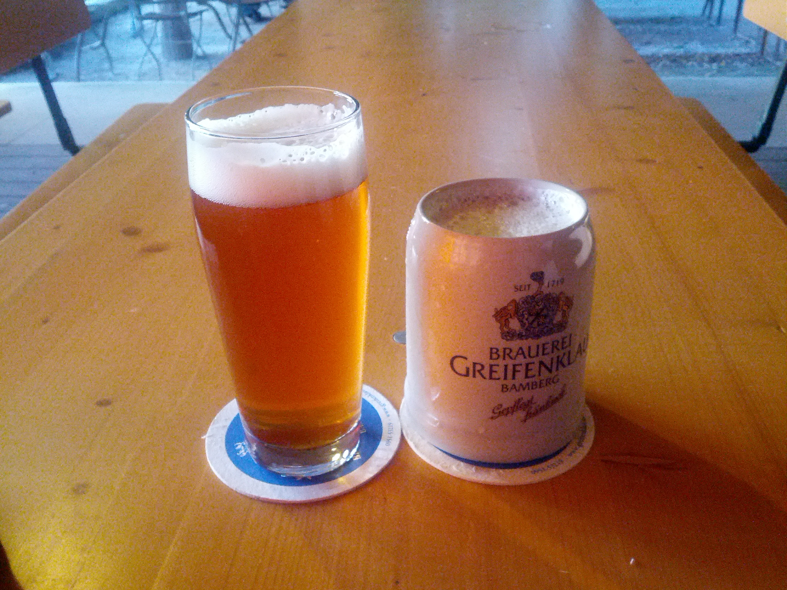 Bier der Bamberger Brauerei Greifenklau